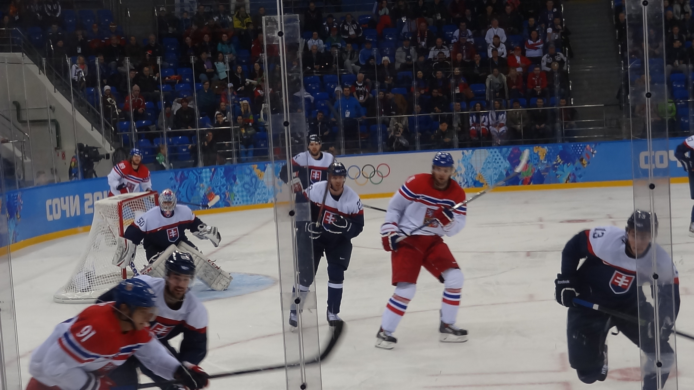 18 февраля 2014 года, Ледовая Арена "Шайба". Чехия - Словакия 5:3 (3:0, 1:1, 1:2)